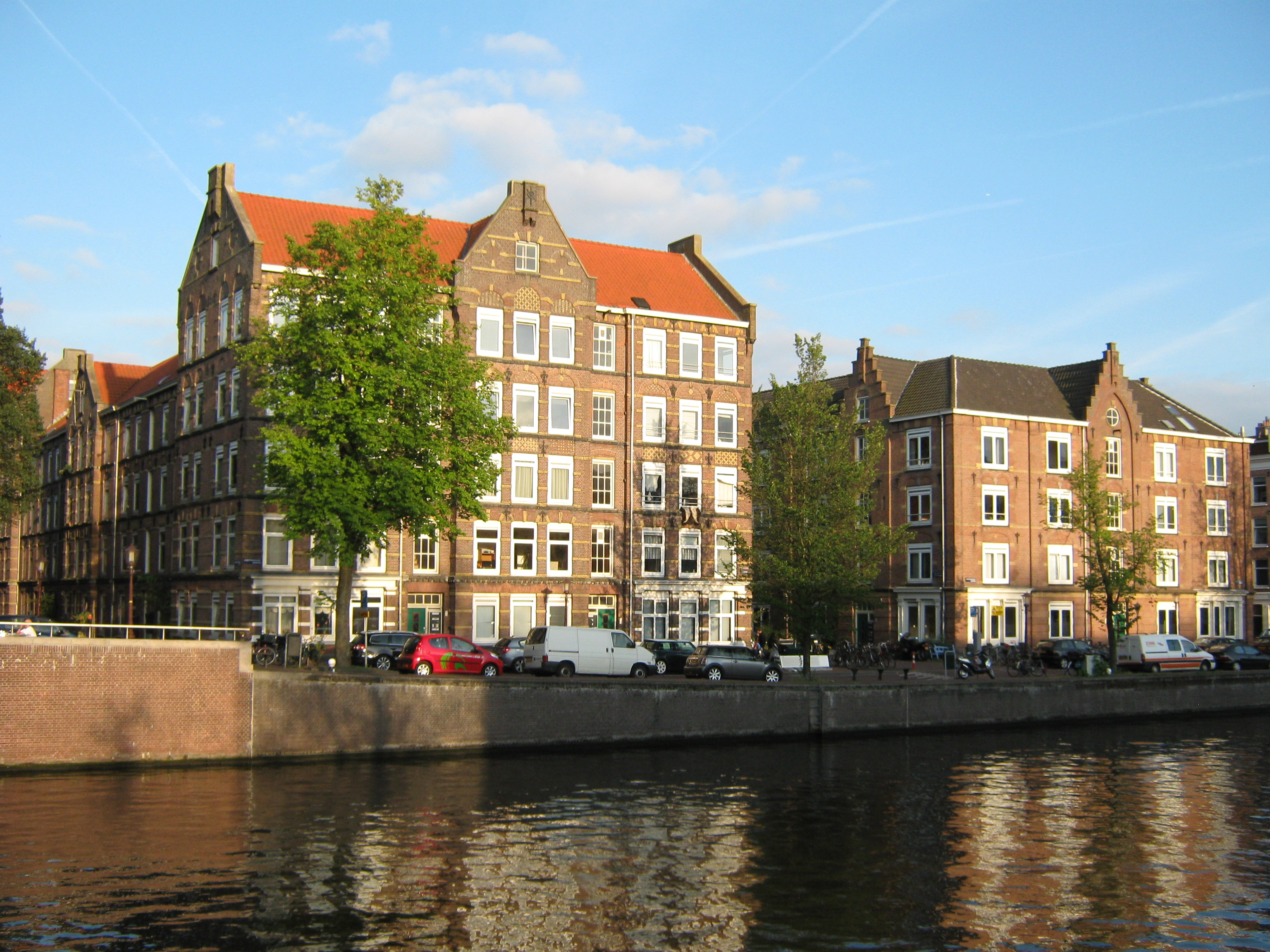 Zeeheldenbuurt Amsterdam, woonblokken arbeiderswoningen gebouwd door de Amsterdamsche Vereeniging tot het bouwen van Arbeiderswoningen